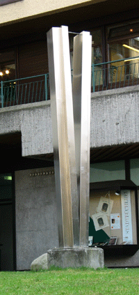 sculpture stainless steel